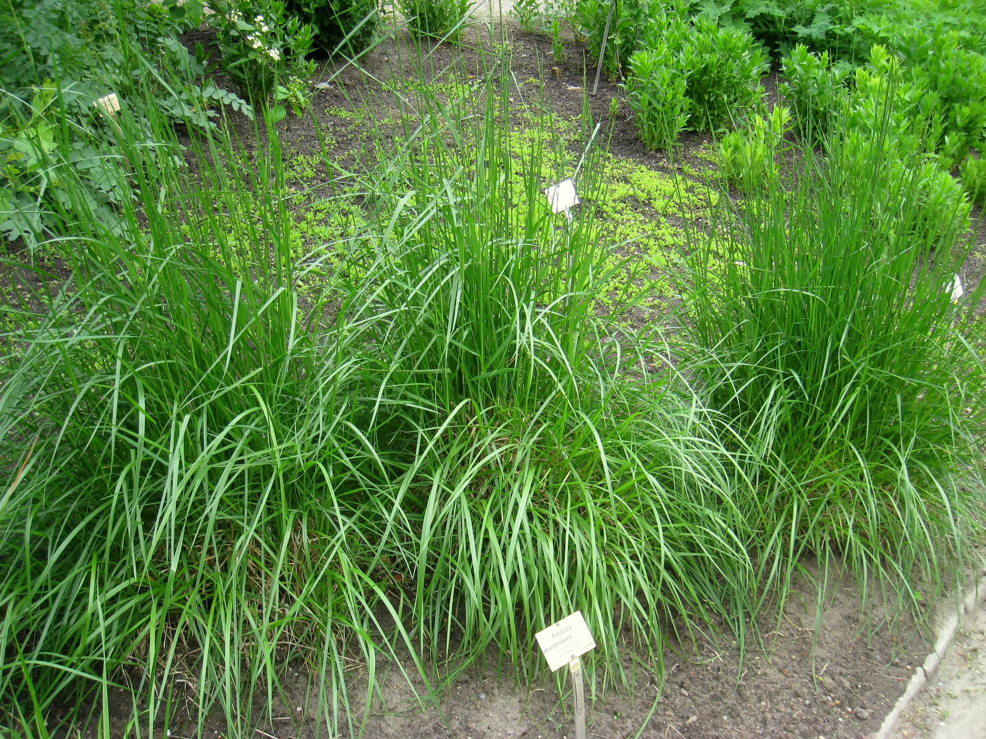 Festuca arundinacea specimen in the Botanischer Garten, Berlin-Dahlem (Berlin Botanical Garden), Berlin, Germany.